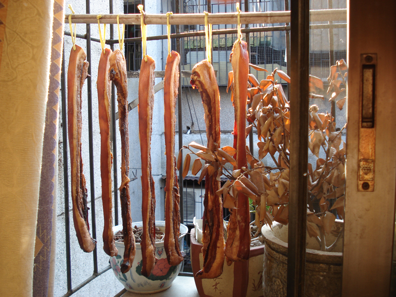 晾晒中的广式腊肉。